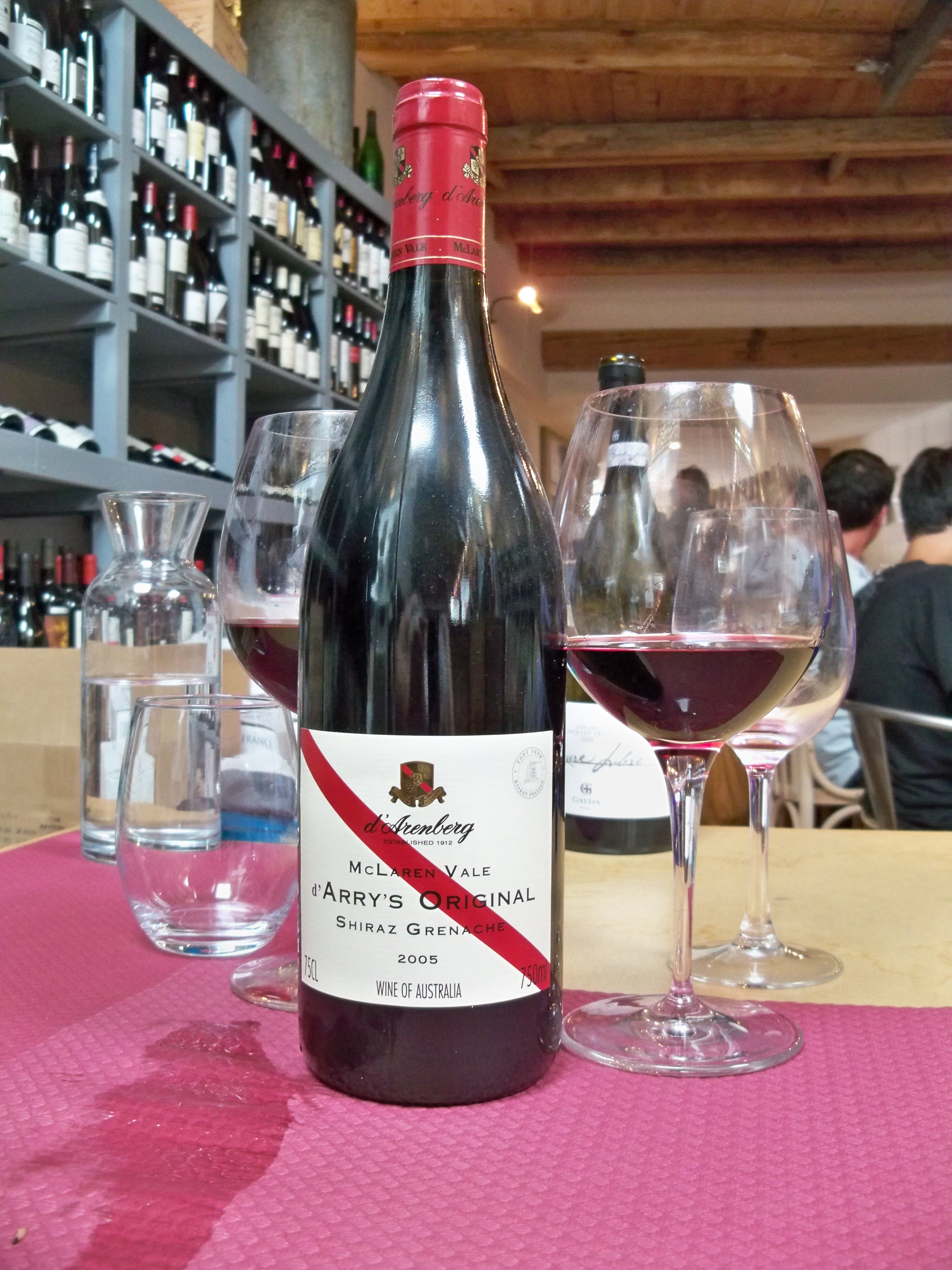 Vin d'Australie